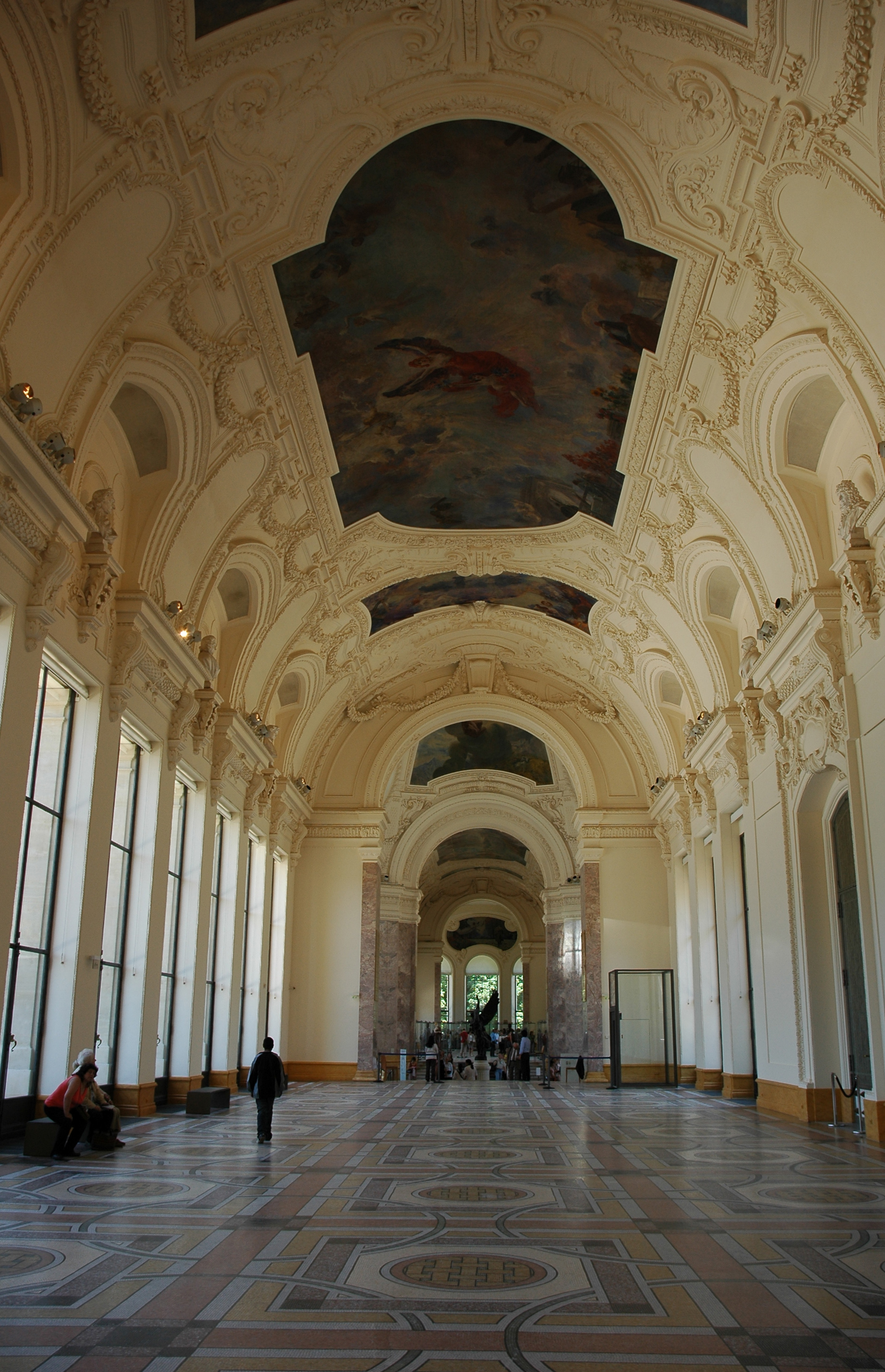 France Paris Petit Palais La galerie des expositions temporaires en 2006 Photographie prise par GIRAUD Patrick